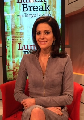 Tanya Rivero